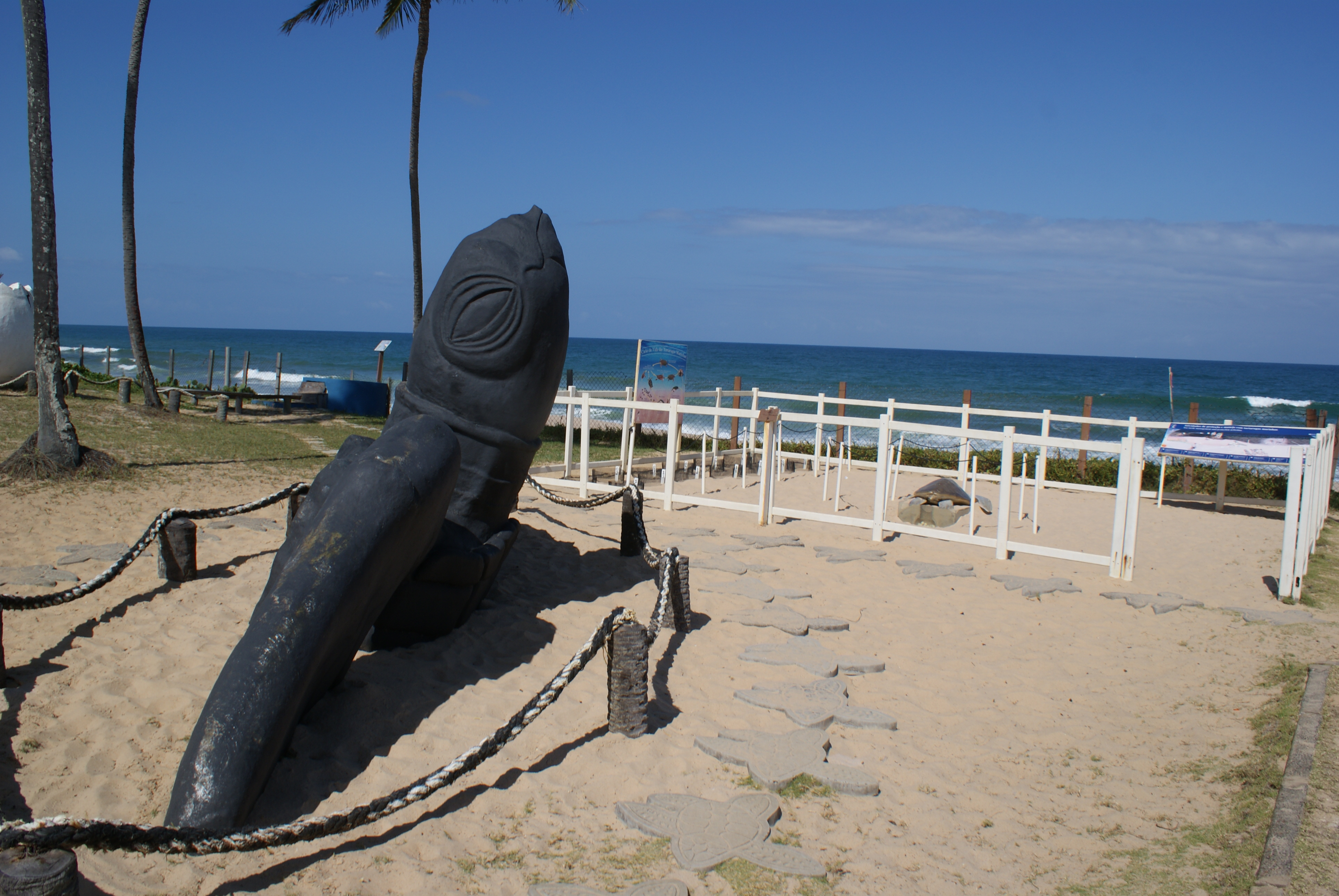 Trip to Salvador & Praia do Forte, Bahia, Brazil